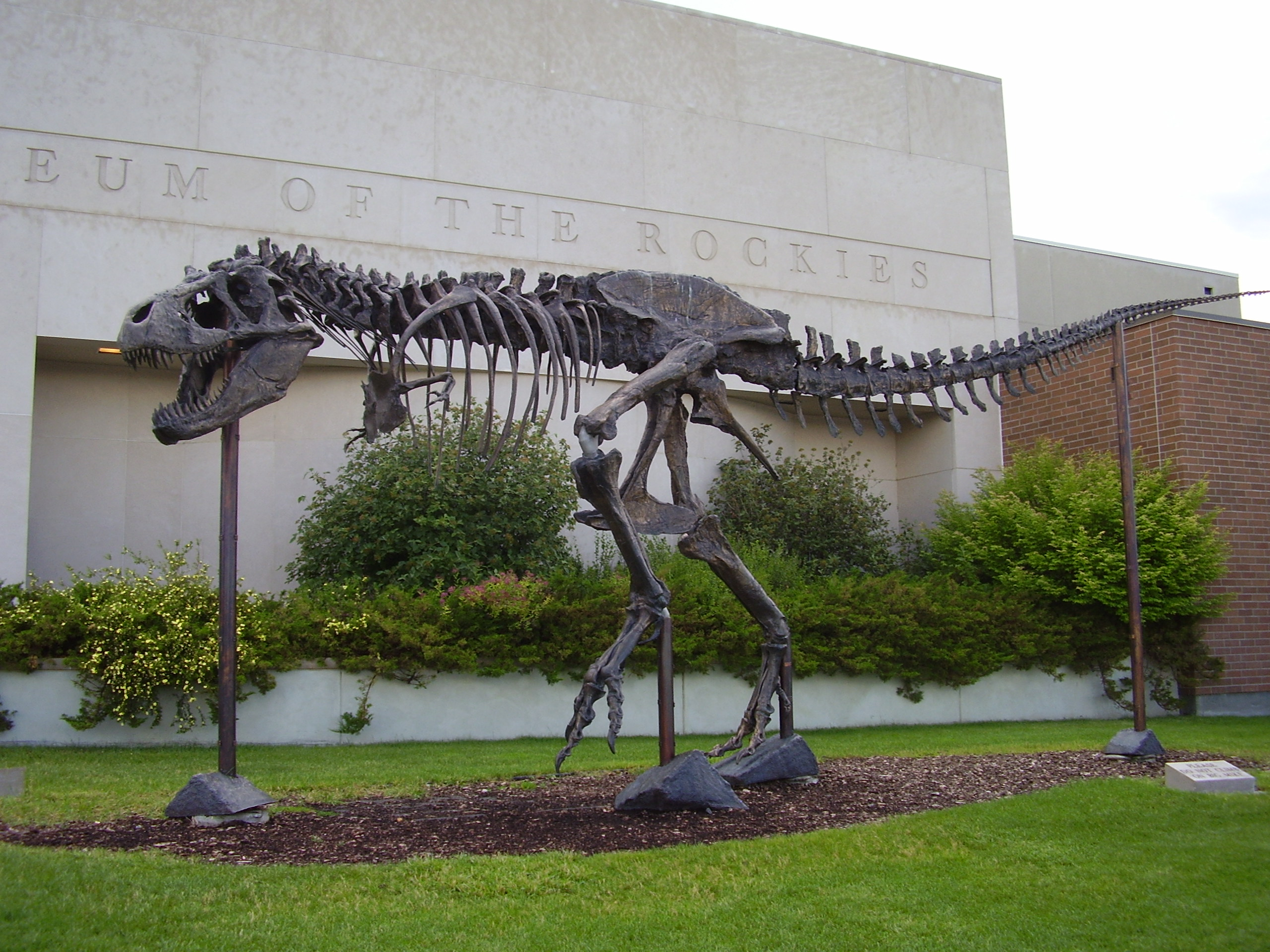 Bronzový odlitek kostry druhu T. rex (exemplář MOR 555 "Big Mike") před vchodem do Museum of the Rockies.